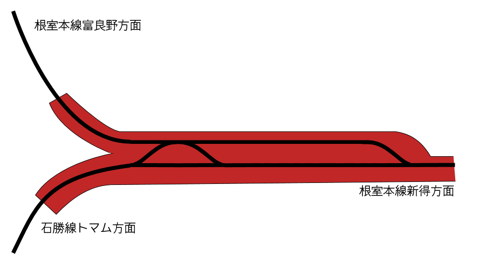 上落合信号所概略図